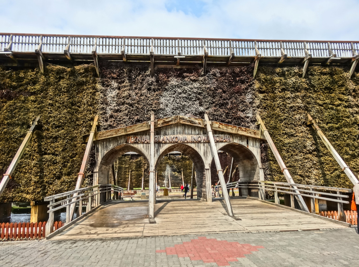 Park Solankowy w Inowrocławiu, tężnie